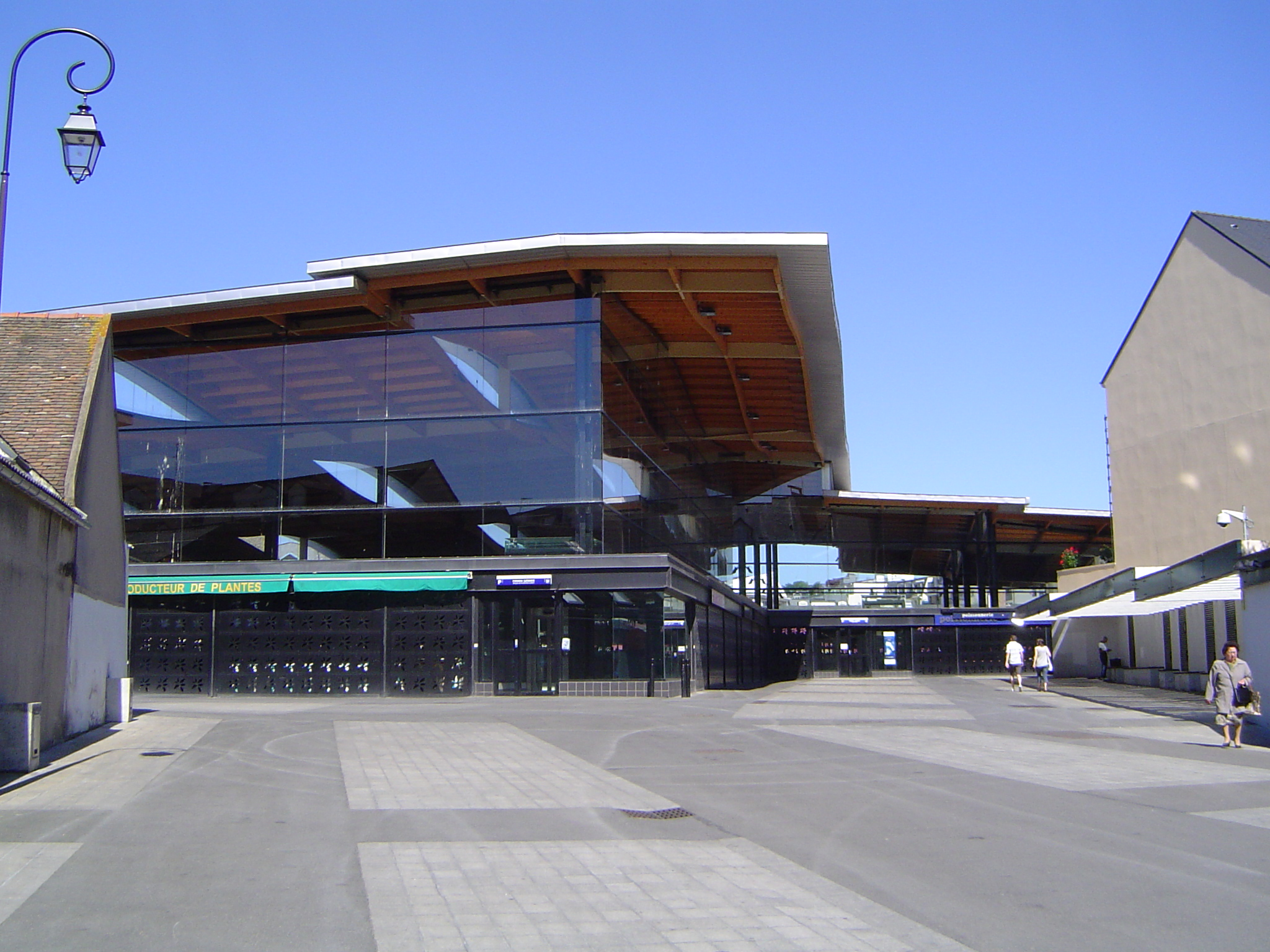 Photos prises à Antony